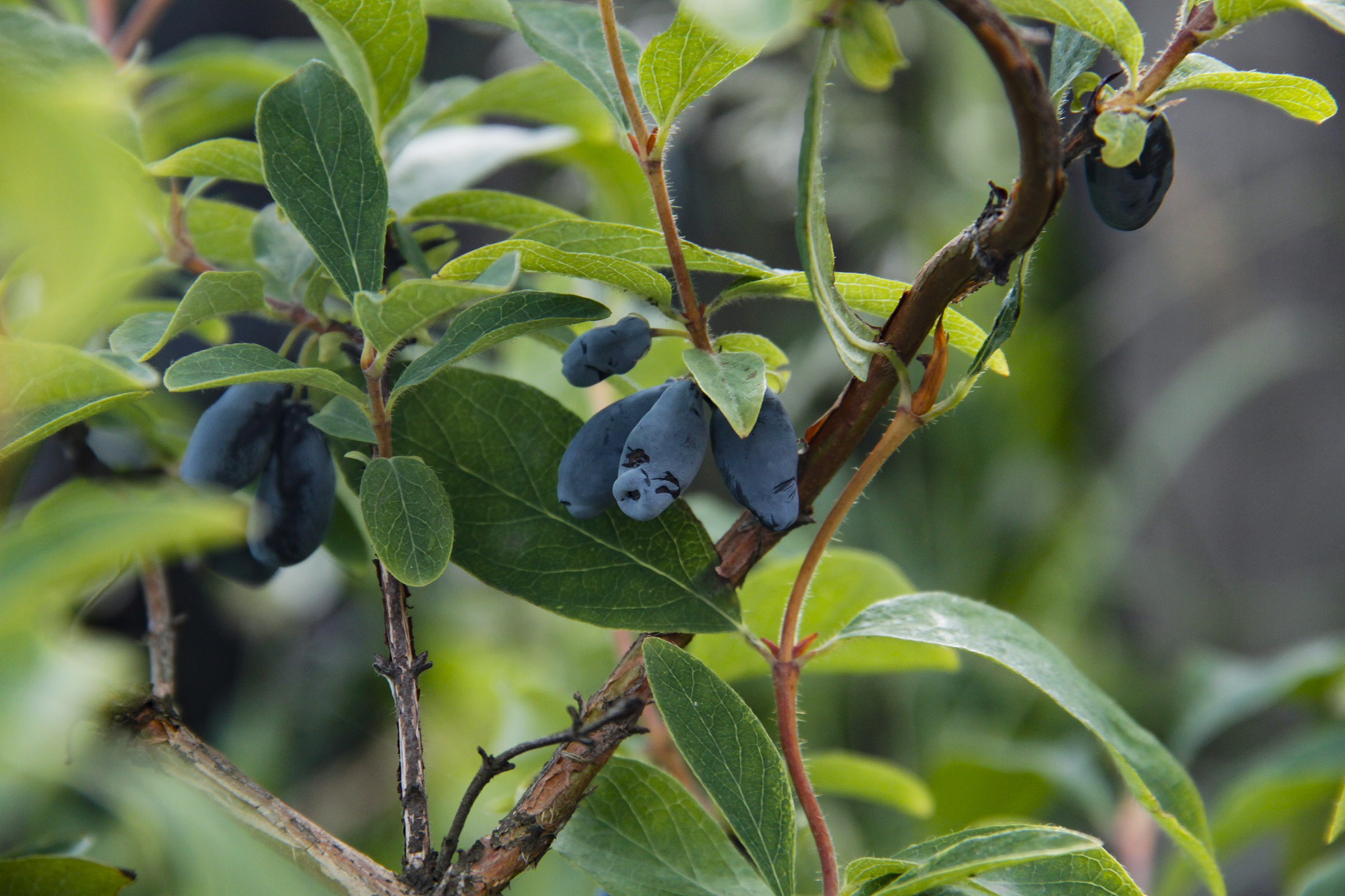 Ветка жимолости с плодами